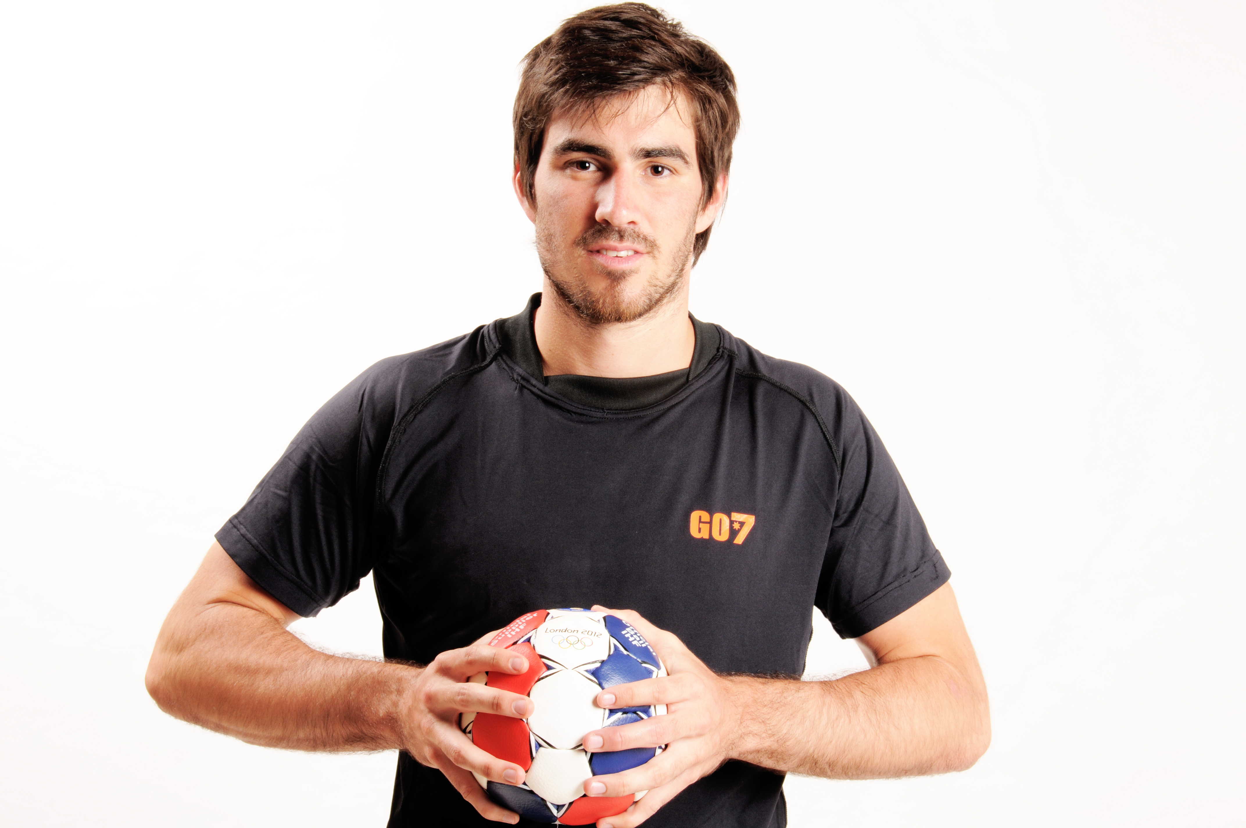 Sebastian Simonet Jugador de Handball Argentina